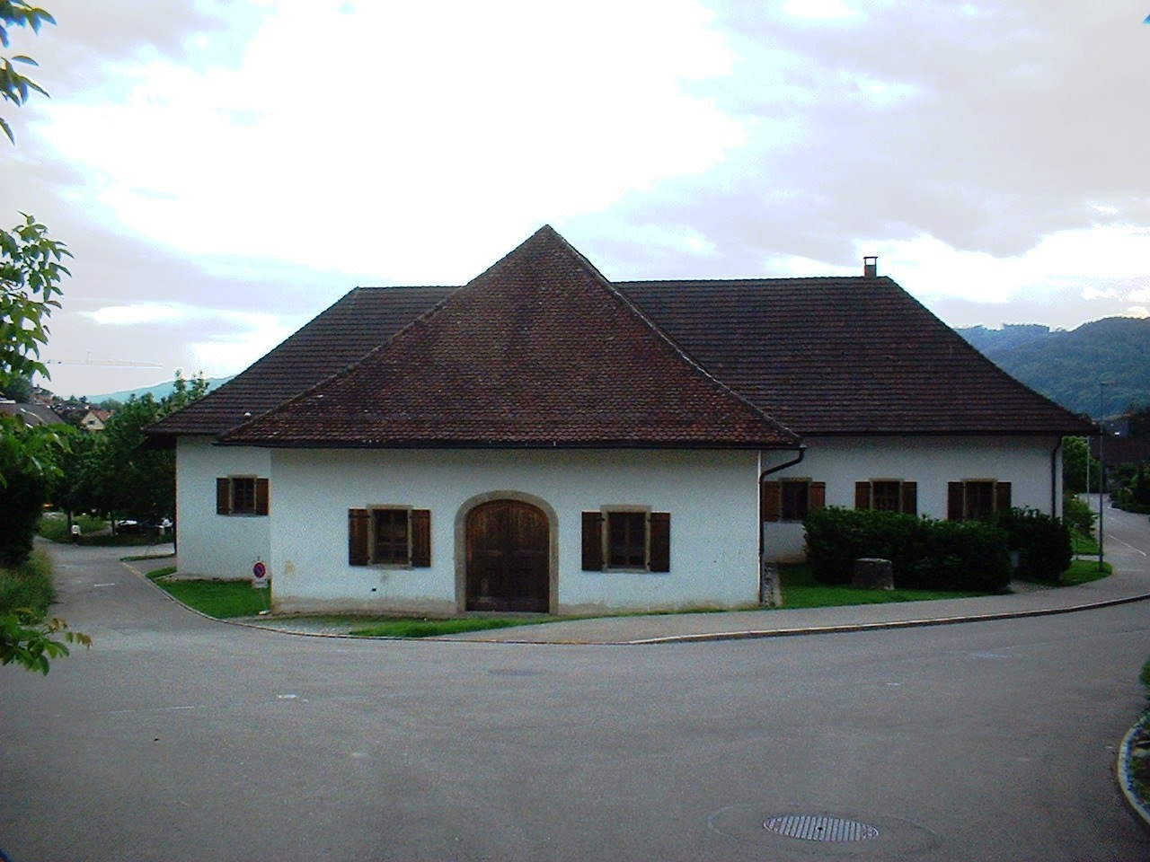 Neutrotte in Wettingen AG, Schweiz